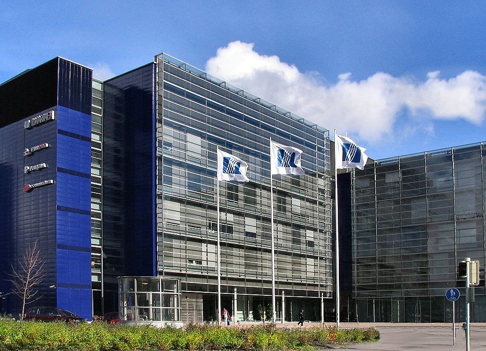 Eläkevakuutusyhtiö Ilmarisen toimitalo Helsingin Ruoholahdessa